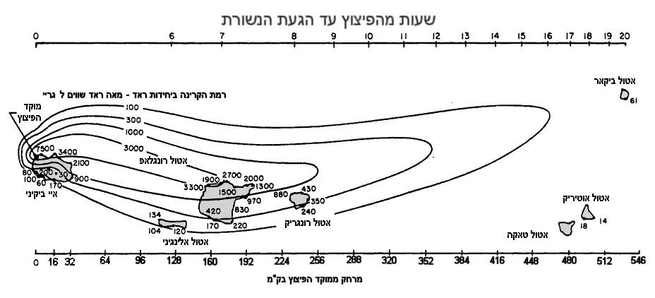 פיזור הנשורת כתוצאה מניסוי קאסטל בראבו - פצצת מימן בת 15 מגאטון